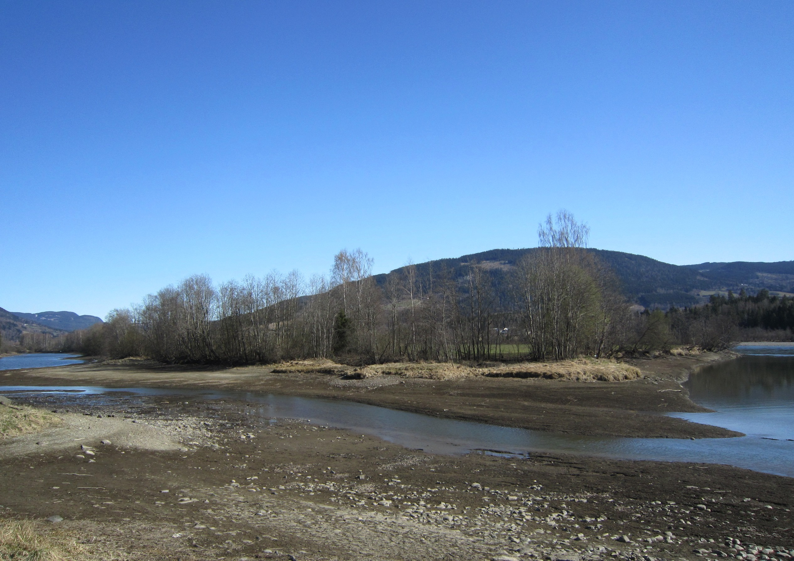 Lågendeltaet sør for Jørstadmoen, like før utløpet i Mjøsa. I bakgrunnen ses Balbergkampen.